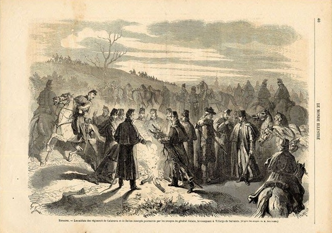 Grabado titulado "Vivac de los húsares de Calatrava y Bailén en Villarejo de Salvanés, 3 de enero de 1866 ". Publicado por Le Monde illustré. Representa el episodio histórico conocido como la Sublevación de Villarejo de Salvanés (Madrid, España).